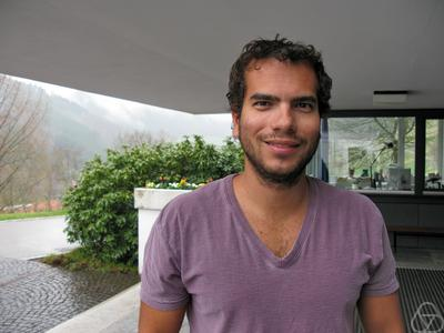 Foto di Artur Ávila a Oberwolfach agli incotri di studio su Quasiperiodic Schrödinger Operators, dal 1° al 7 aprile 2012